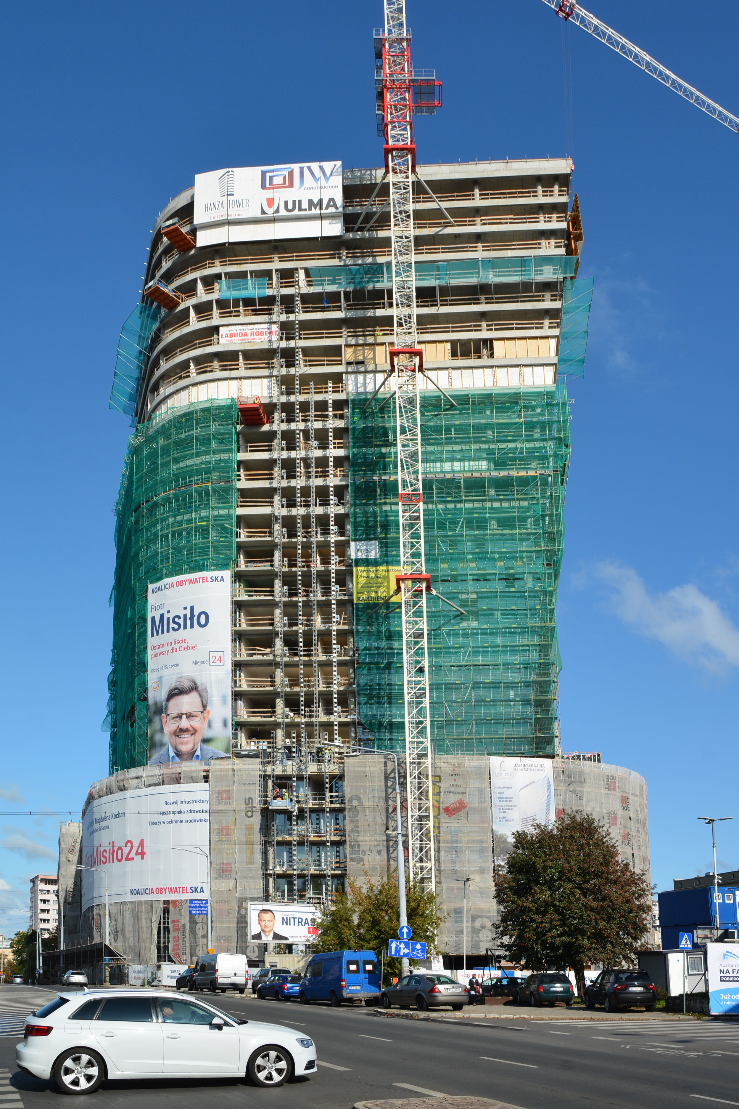 Wieżowiec Hanza Tower w Szczecinie w budowie